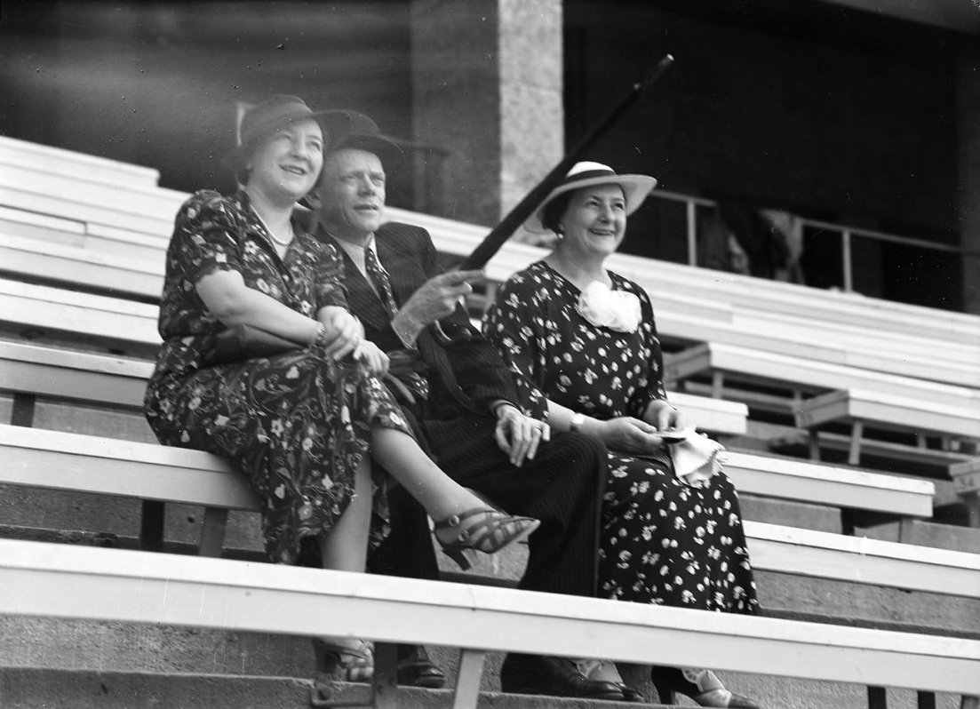 Berlin: Liesl Karlstadt (links), Karl Valentin (Mitte) und unbekannte Frau im Olympiastadion